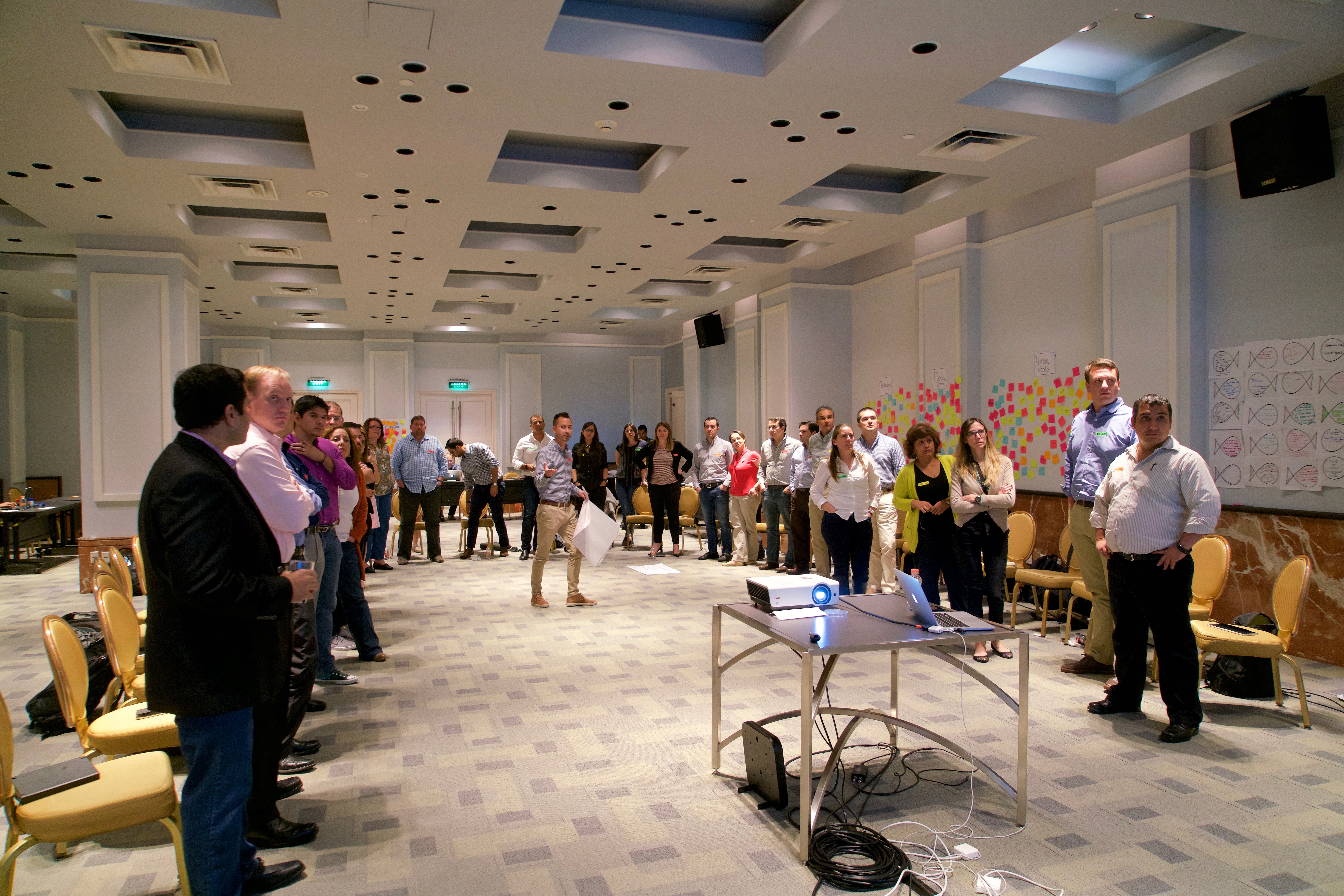 En typisk scen från en masterclass. Öppen halvcirkel, talaren i mitten, väggar fyllda av post-it och blädderblock.